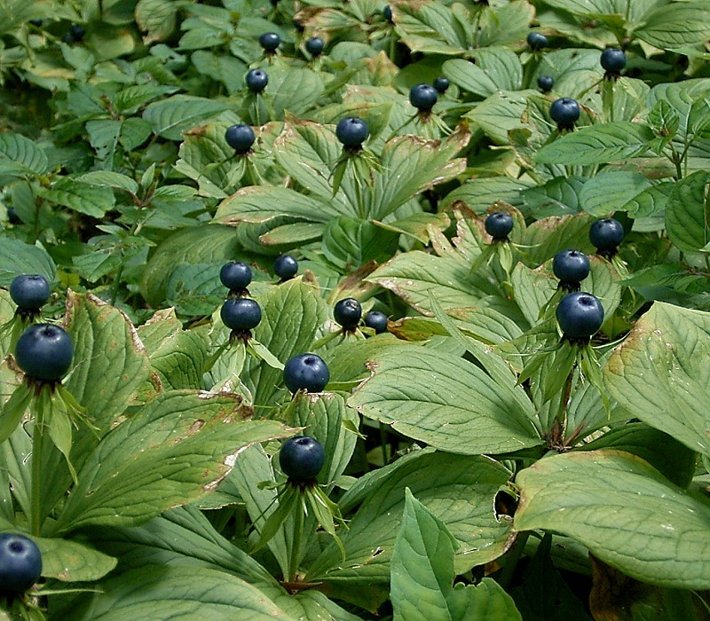 Paris quadrifolia